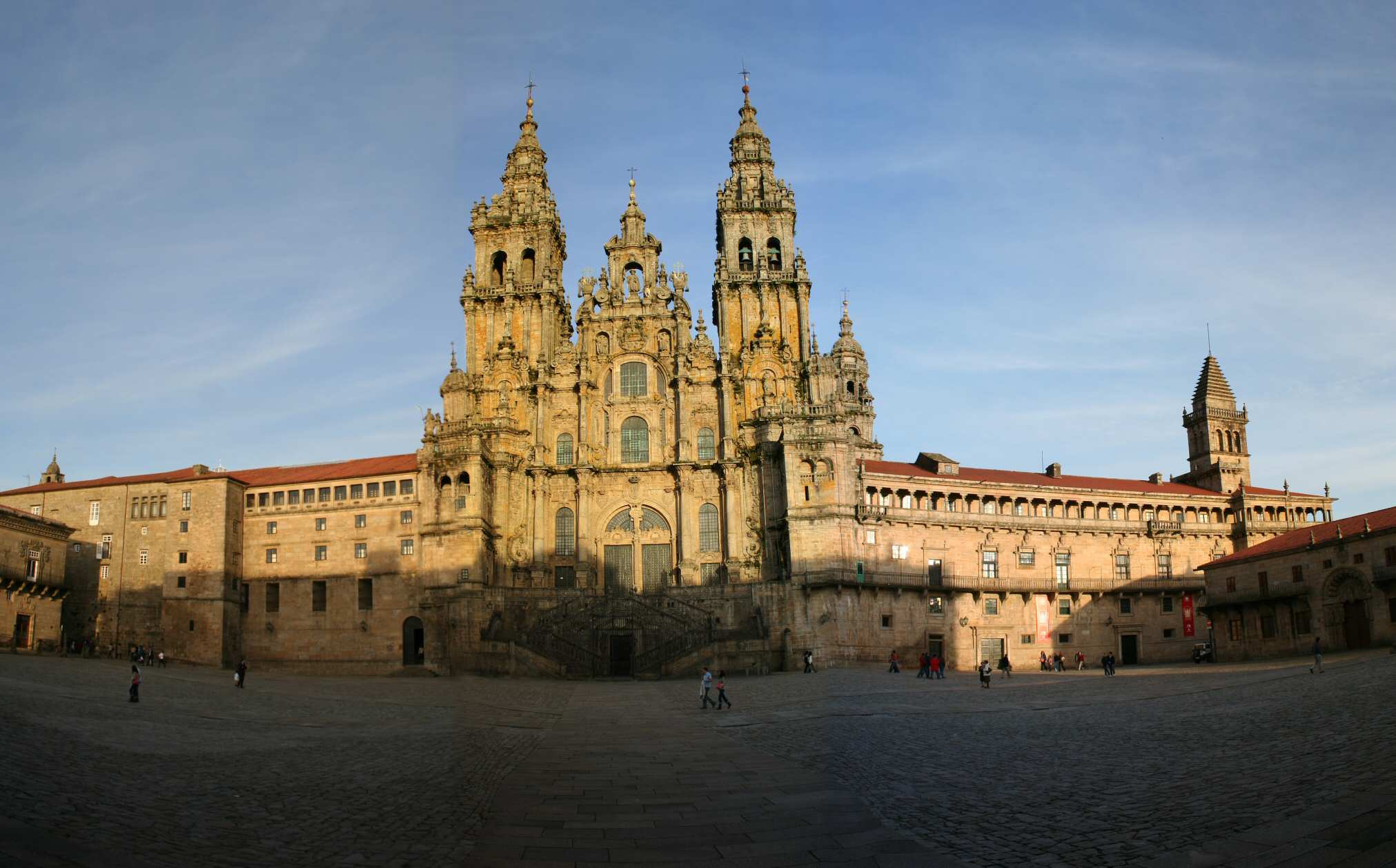 Panorama der Kathedrale von Santiago de Compostela im Herbst 2005, durch die Software ist das Foto im Pflaster etwas "surrealistisch" ;-)